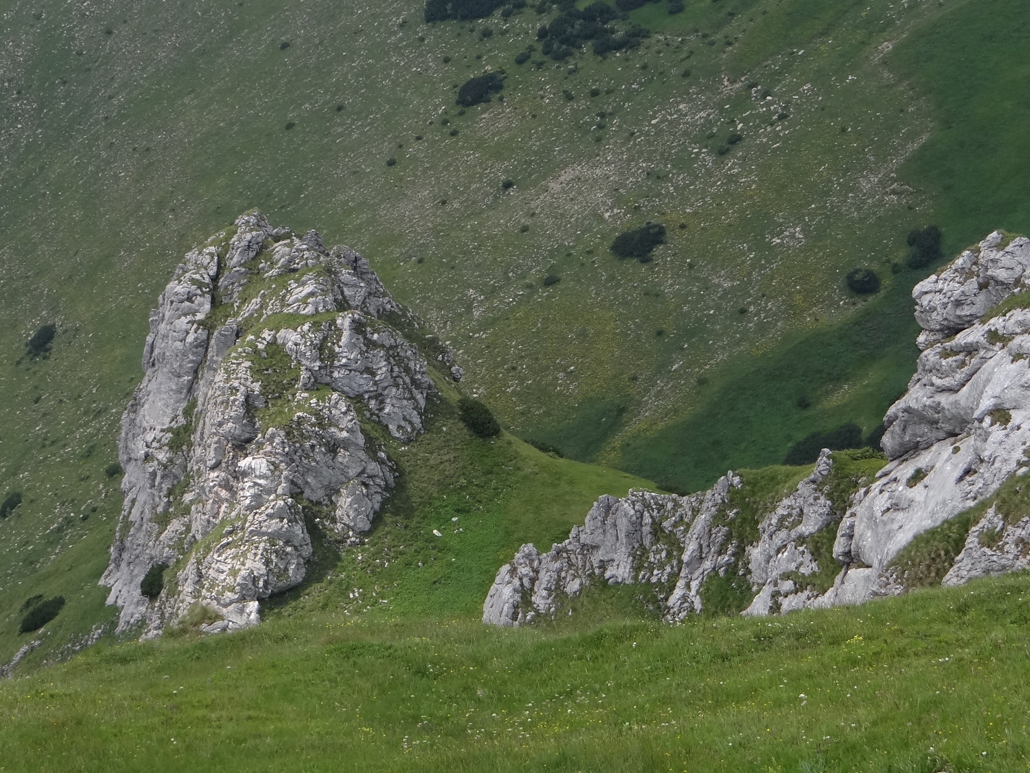 Lodowa Baszta i Lodowe Siodło w Dolinie Kościeliskiej